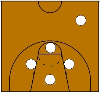 Basketball Zone Defense